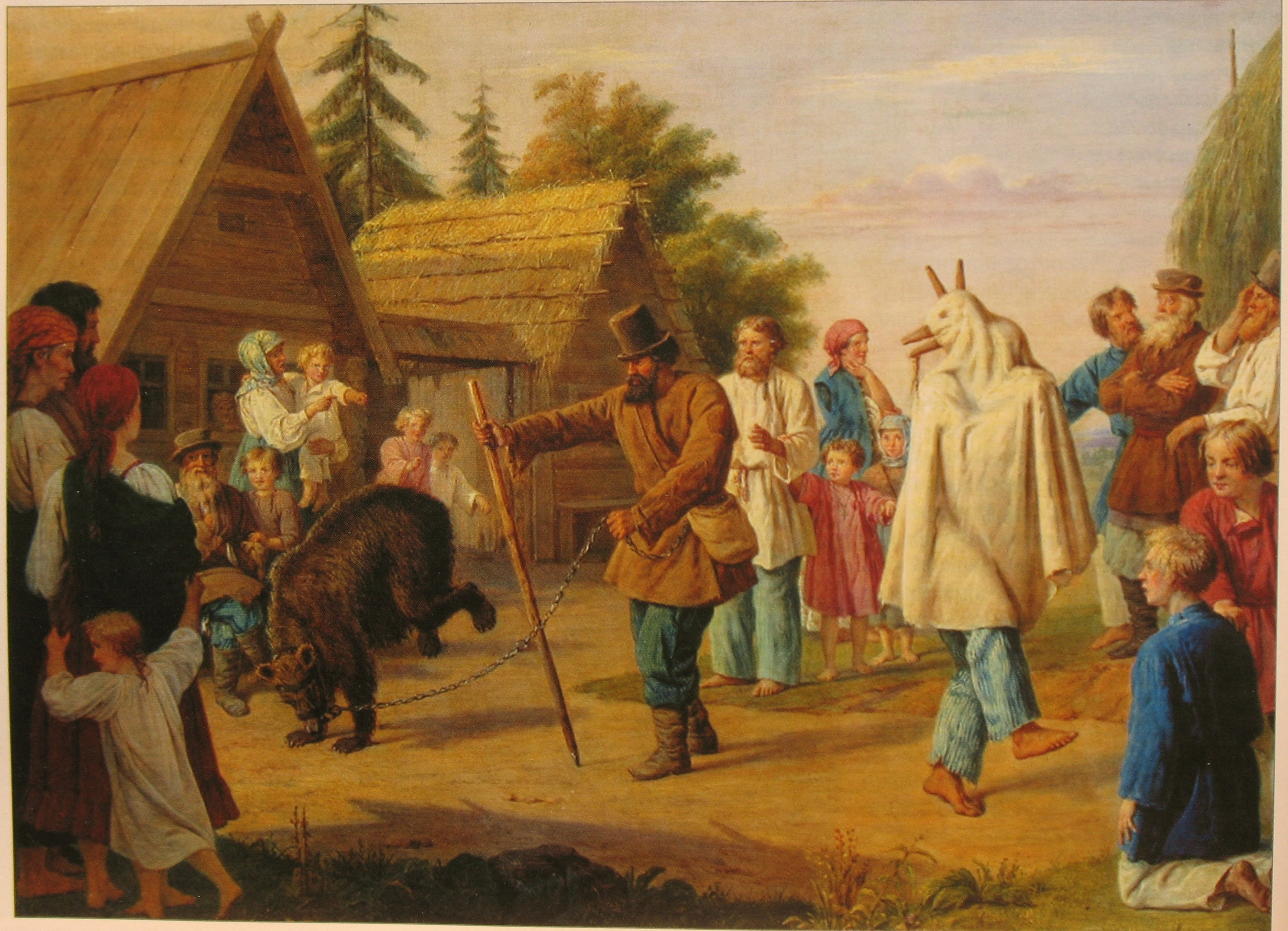 Франц Рисс. Скоморохи в деревне. Хромолитография. Российская Империя, 1857.